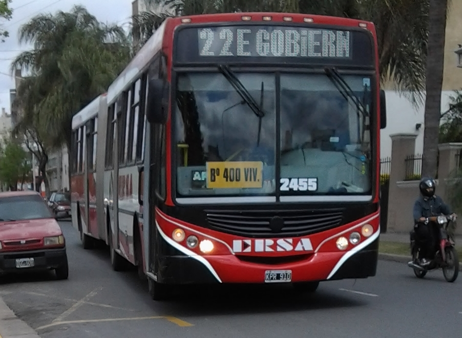 Interno 2455 articulado de la línea 22 de la ciudad de Paraná. ColectivosEntreRios.